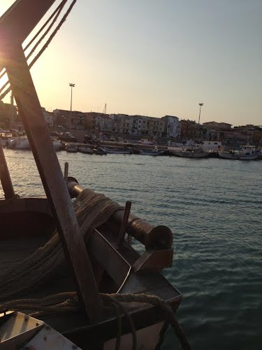 Il porto di Cirò Marina. Per altre foto